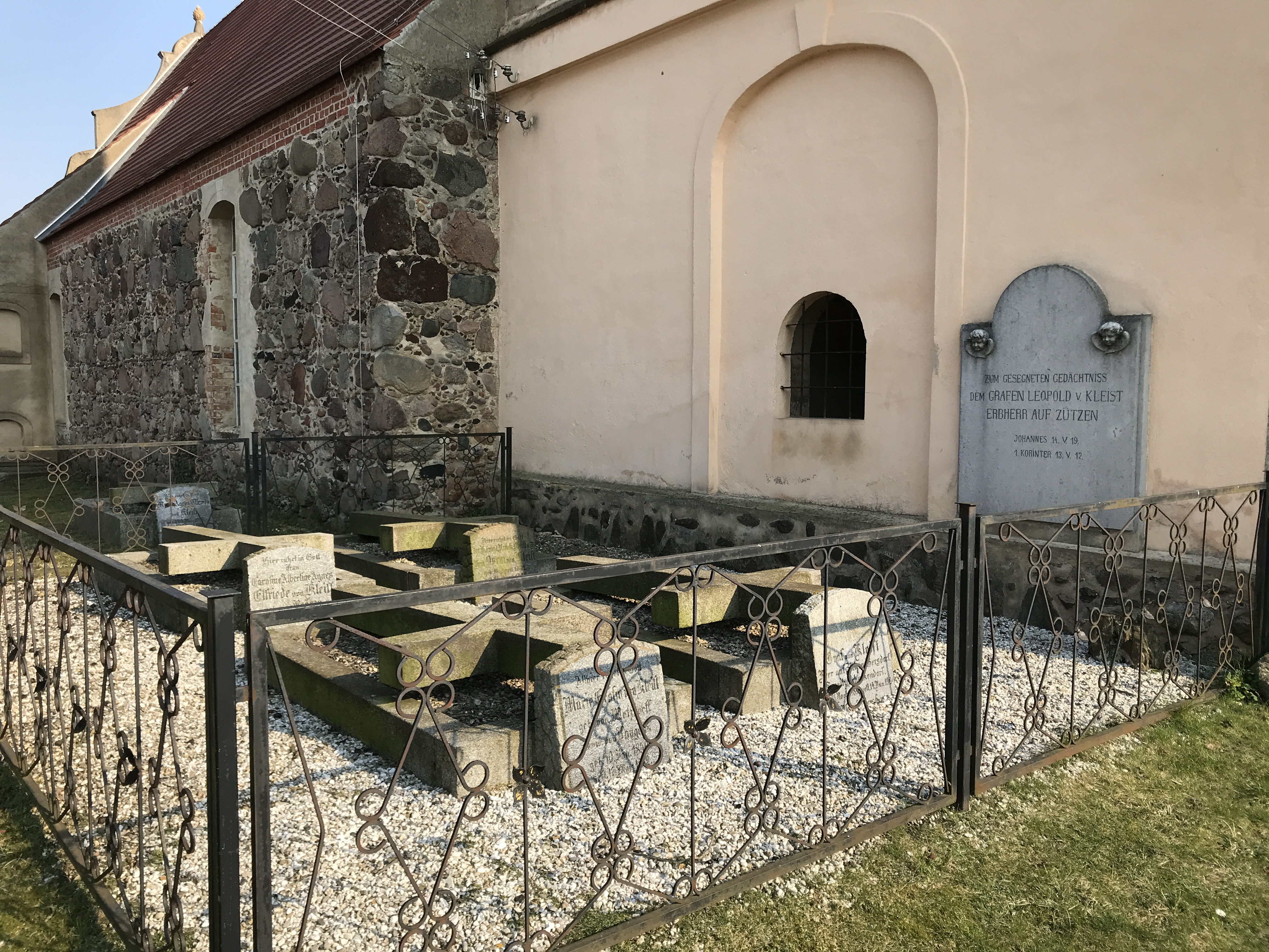 Die Dorfkirche Zützen ist eine Feldsteinkirche in Zützen, einem Ortsteil der Stadt Golßen im Landkreis Dahme-Spreewald im Land Brandenburg. Im Innern steht unter anderem ein frühbarocker Altaraufsatz aus dem Jahr 1710.